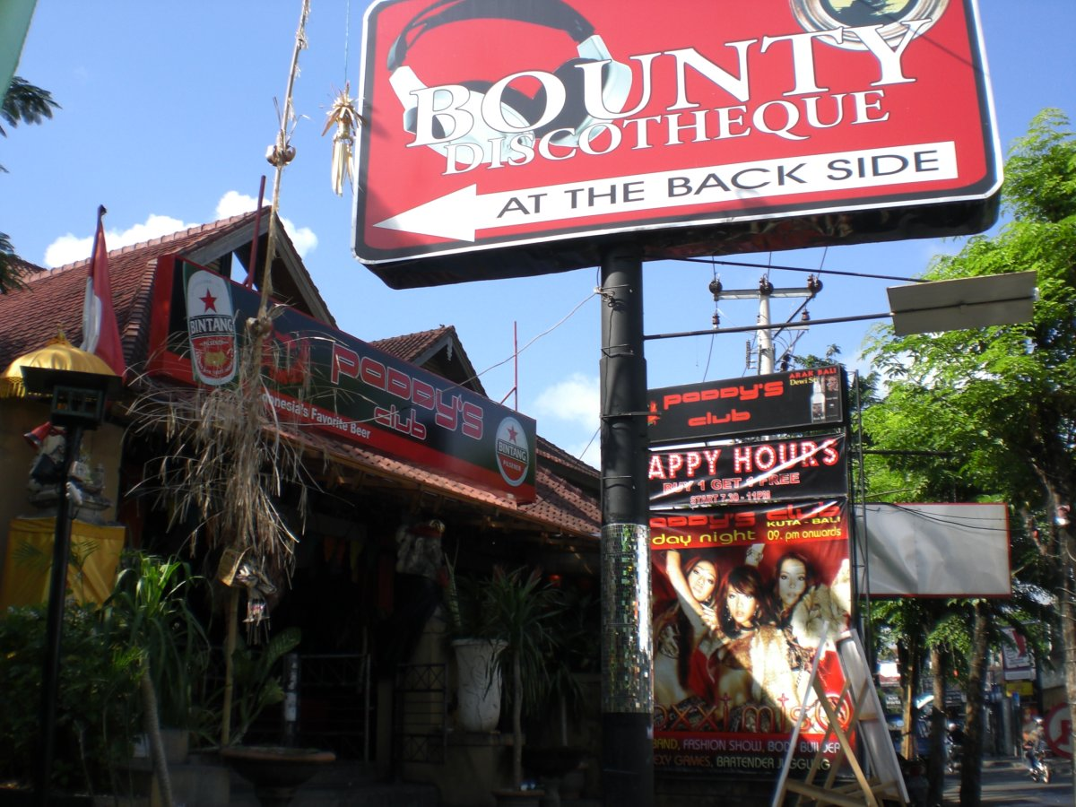 Paddy's Club in Kuta, Bali, Indonesia